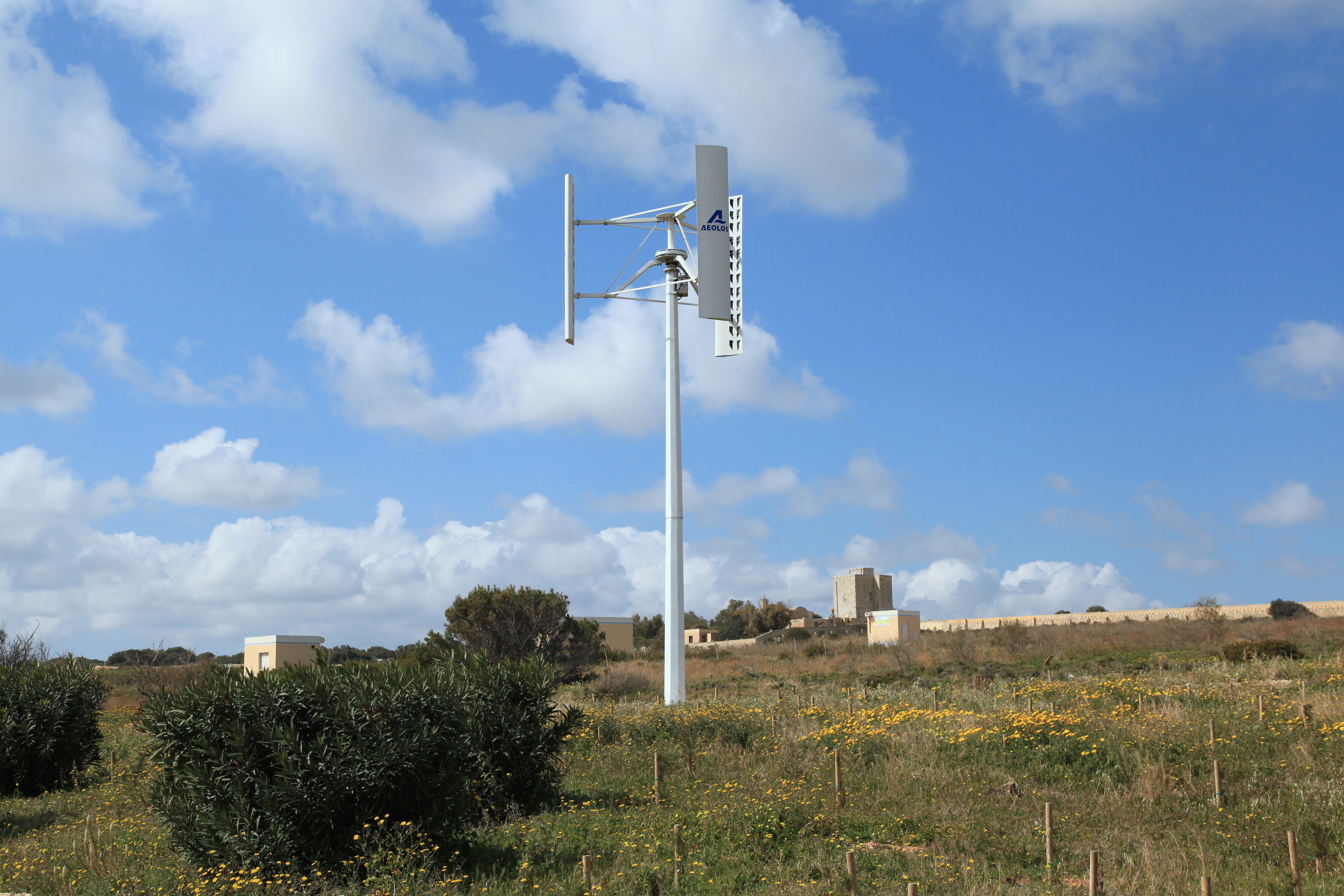 Xrobb l-Għaġin Park, Triq Delimara in Marsaxlokk, Malta